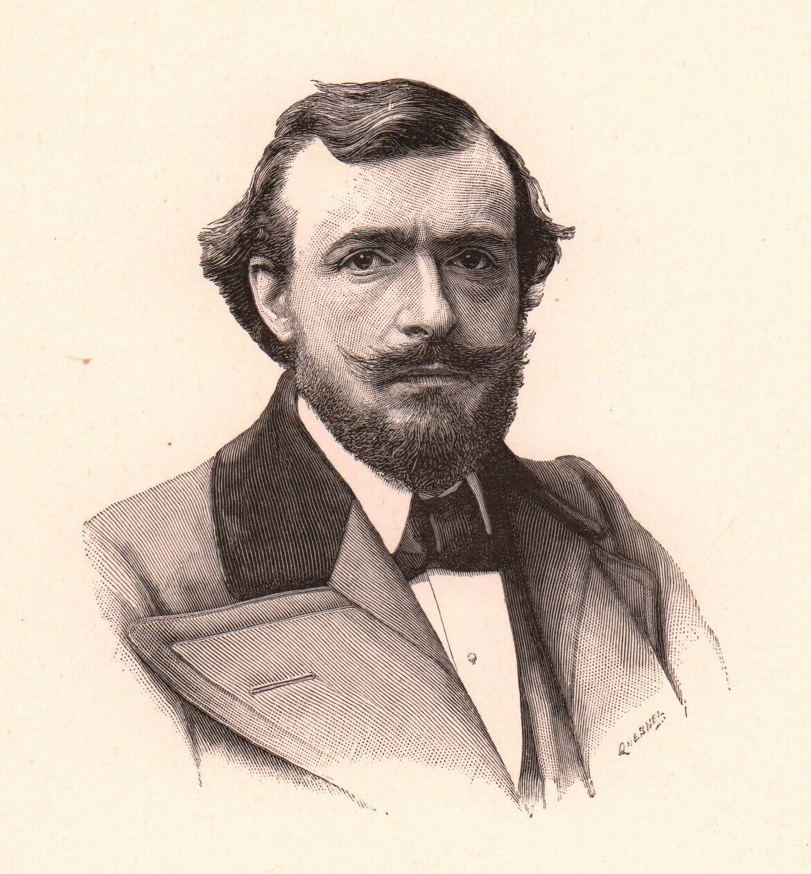 French sculptor Théodore Rivière (1857-1912)